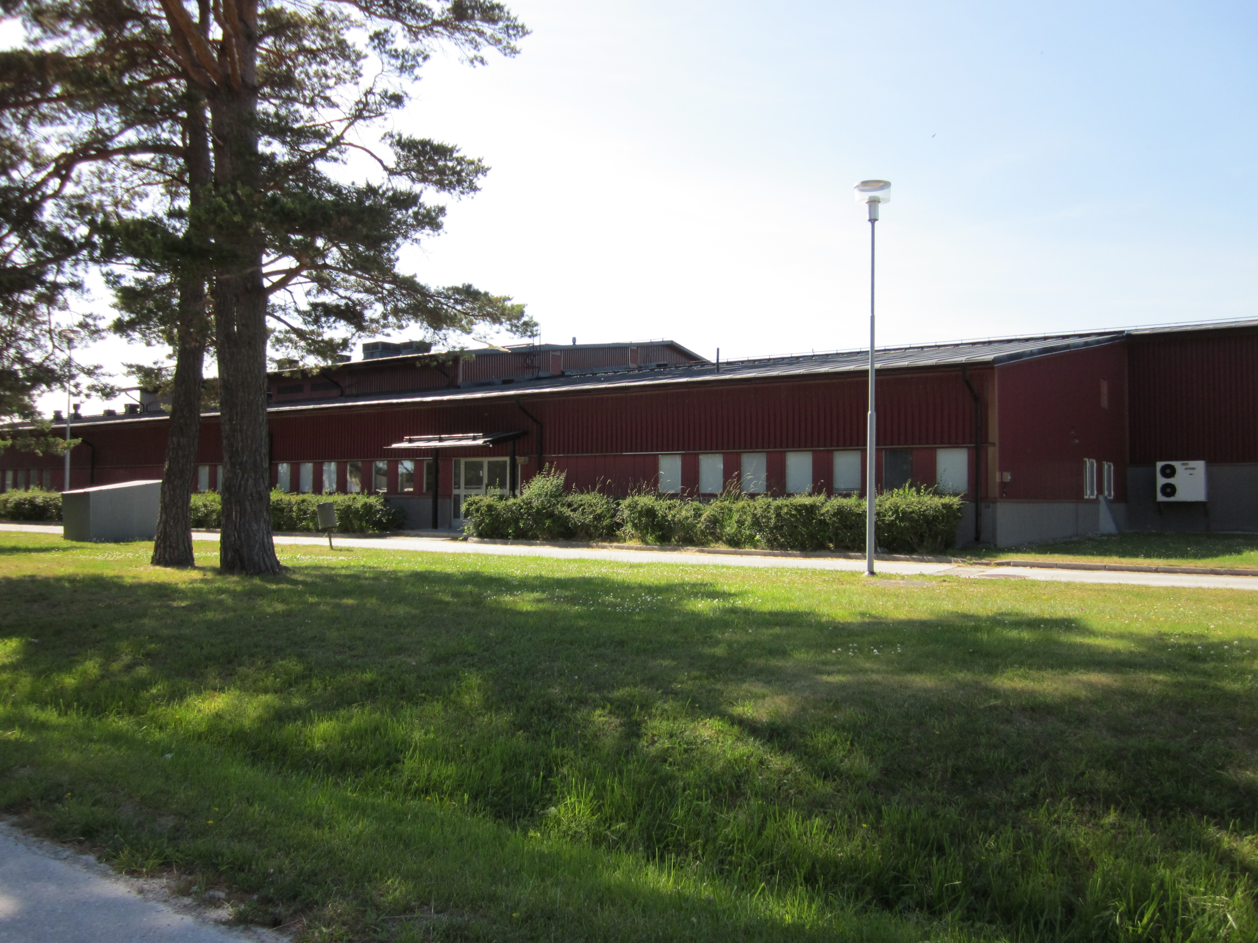 Övnings- och vårdhall på Gotlands regementes (P 18) område. Uppförd 1986 för Gotlands luftvärnsbataljon/kår. Användes till Robot 70-utbildning och Bofors 40/70 20 mm lv-akan-utbildning. I den västra delen skedde utbildning och i ett rum bakom fanns simulatorhallen. På baksidan fanns lokaler för bland annat pjäsexercis. Numera (2011) används byggnaden av dataföretaget Koneo samt förskolan Väduren. Se även denna länk.